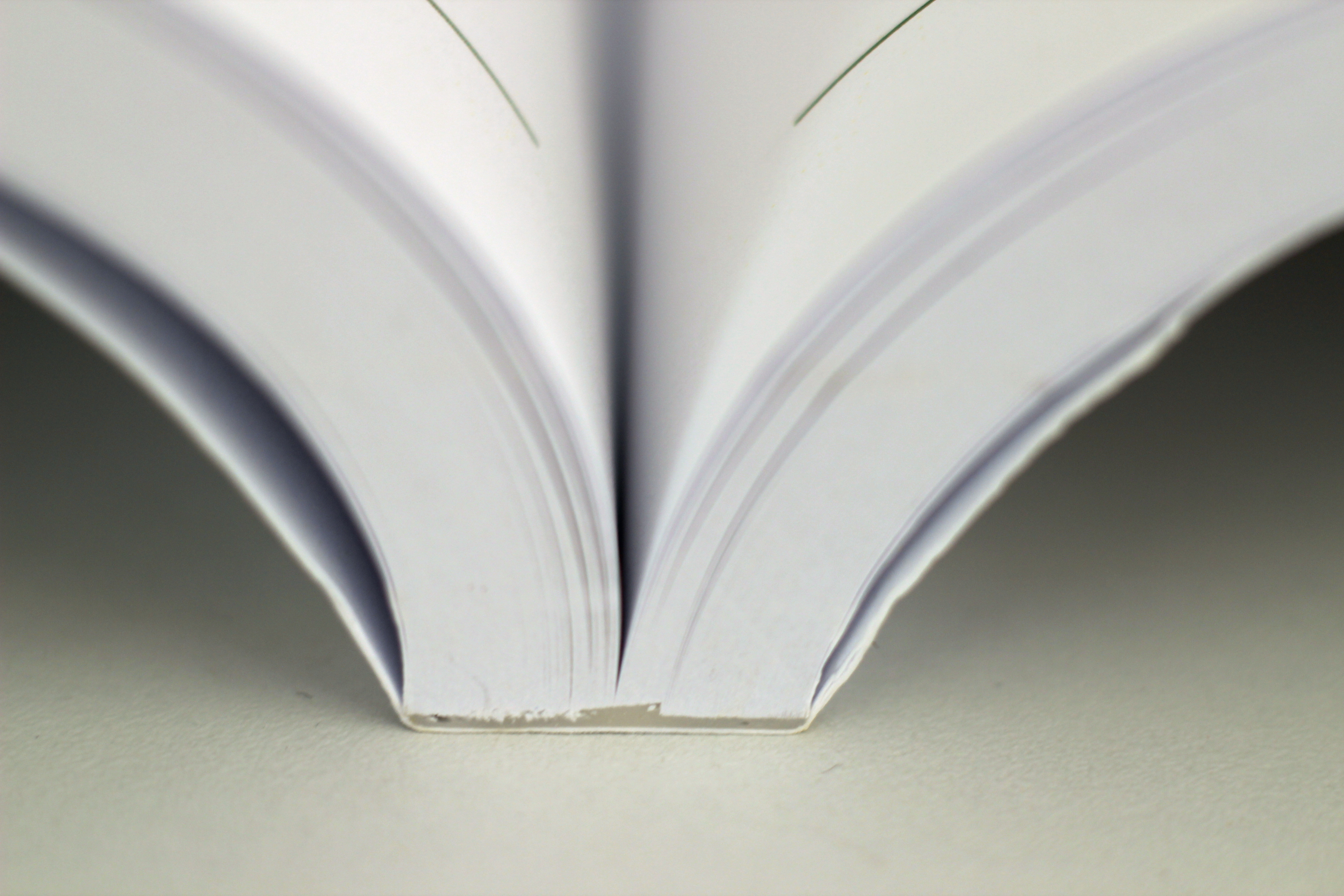 Bildinhalt: Klebebindung eines Softcover-Buches Aufnahmeort: Frankfurt am Main, Deutschland